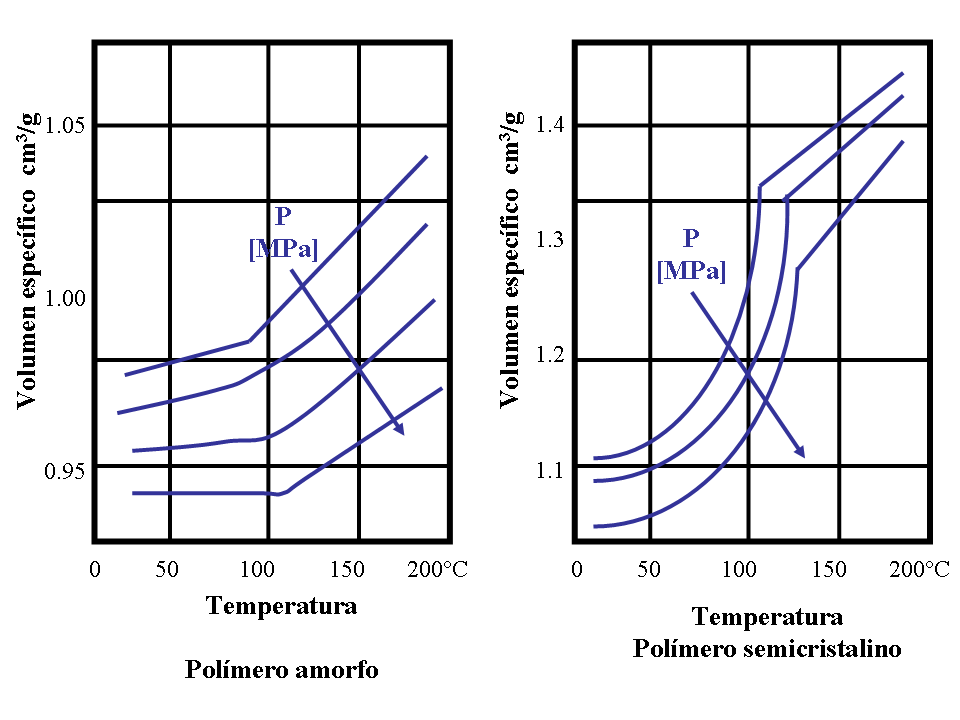 Enfriamiento de polímeros amorfos y cristalinos